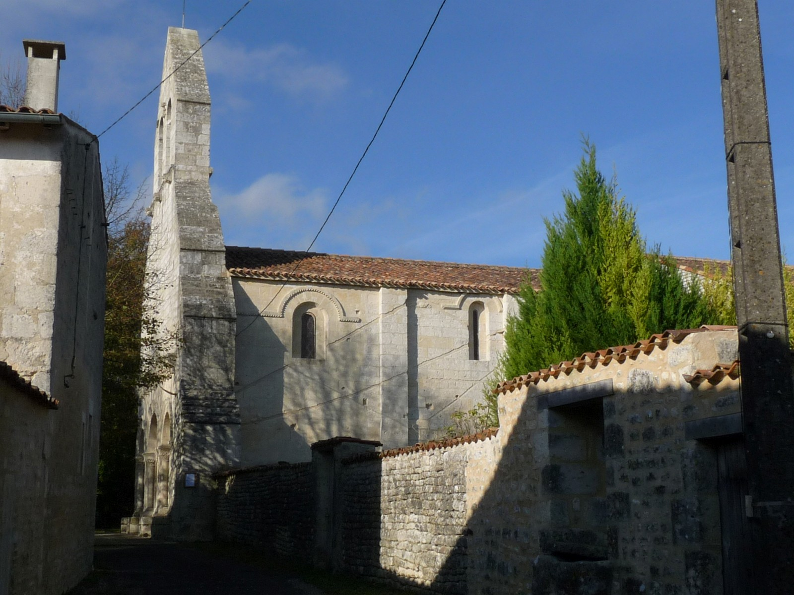 Eglise de Bresdon, Charente-Maritime, France